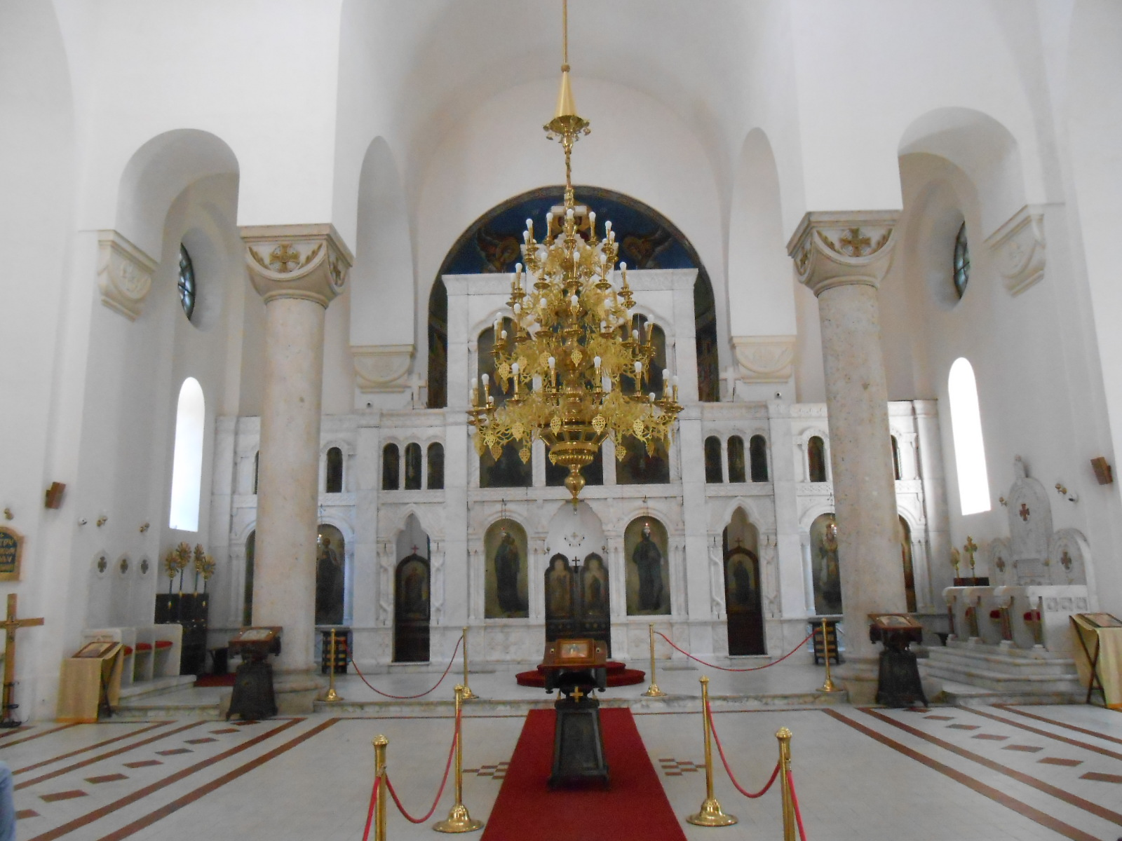 Navata della chiesa di Aleksandr Nevski a Belgrado